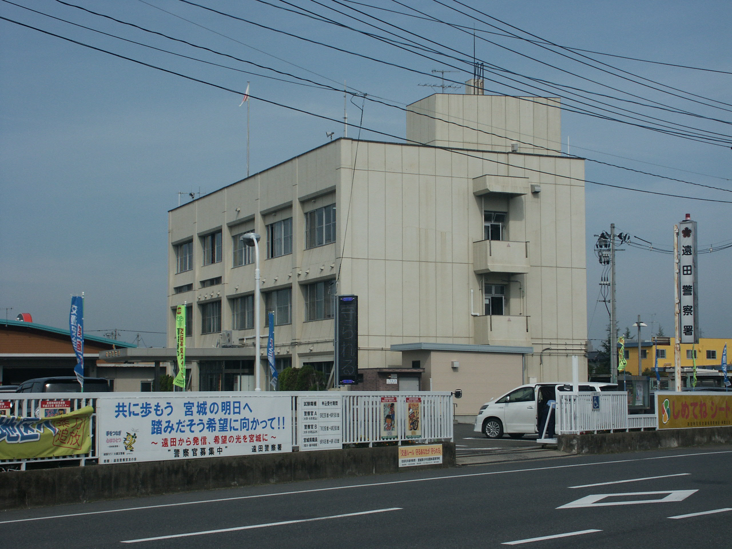 宮城県遠田警察署庁舎